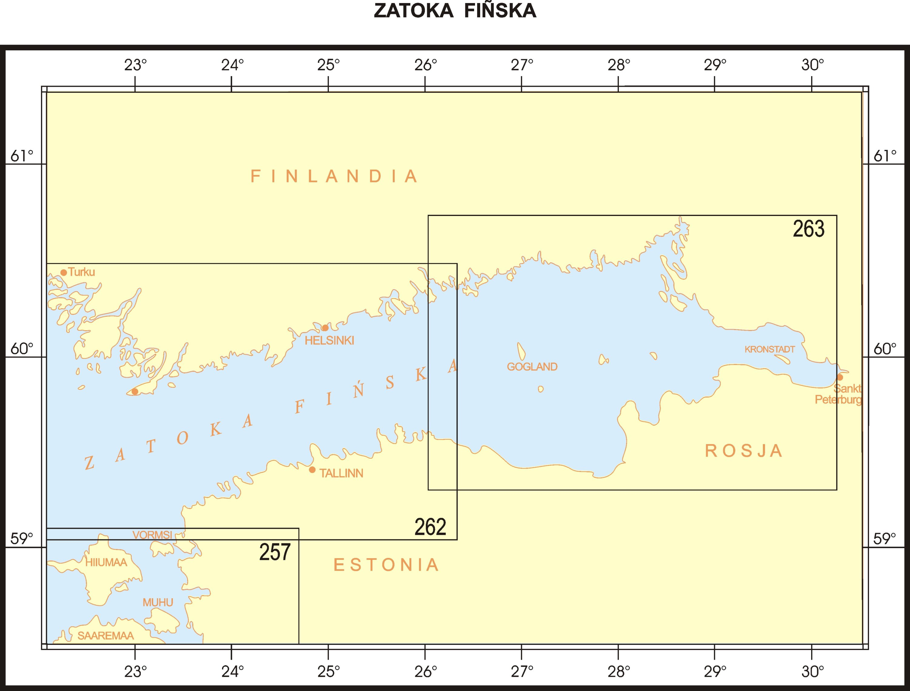 Mapy Biura Hydrograficznego Marynarki Wojennej - Zatoka Fińska